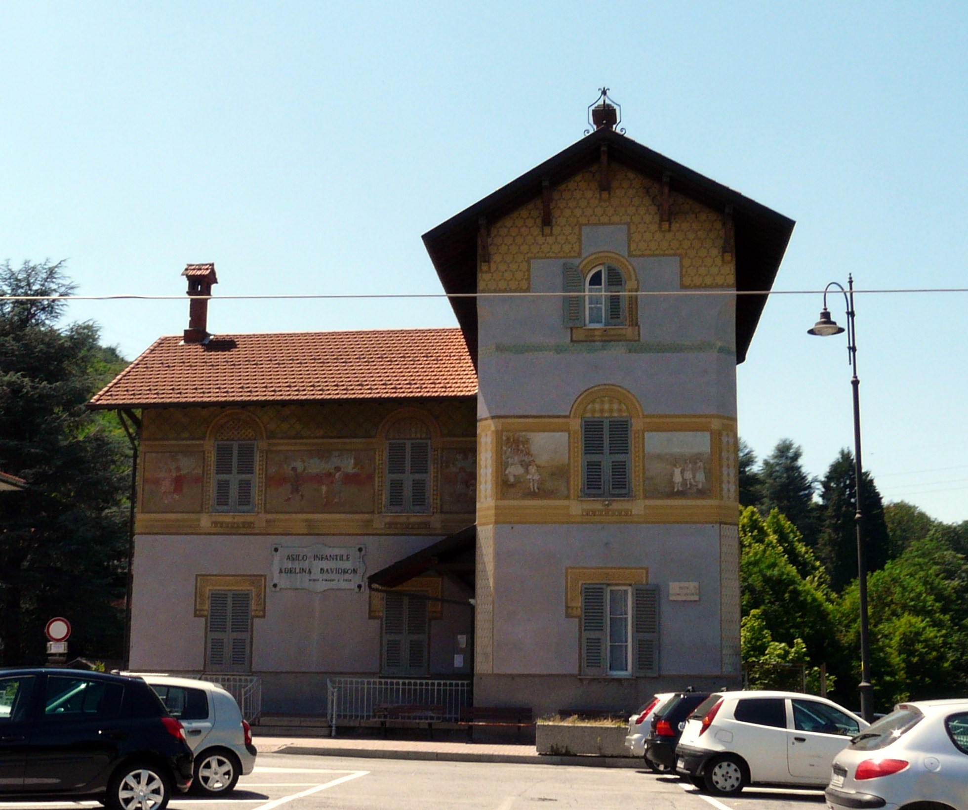 L'asilo infantile Adelina Davidson, Borgo Fornari, Ronco Scrivia, Liguria, Italia